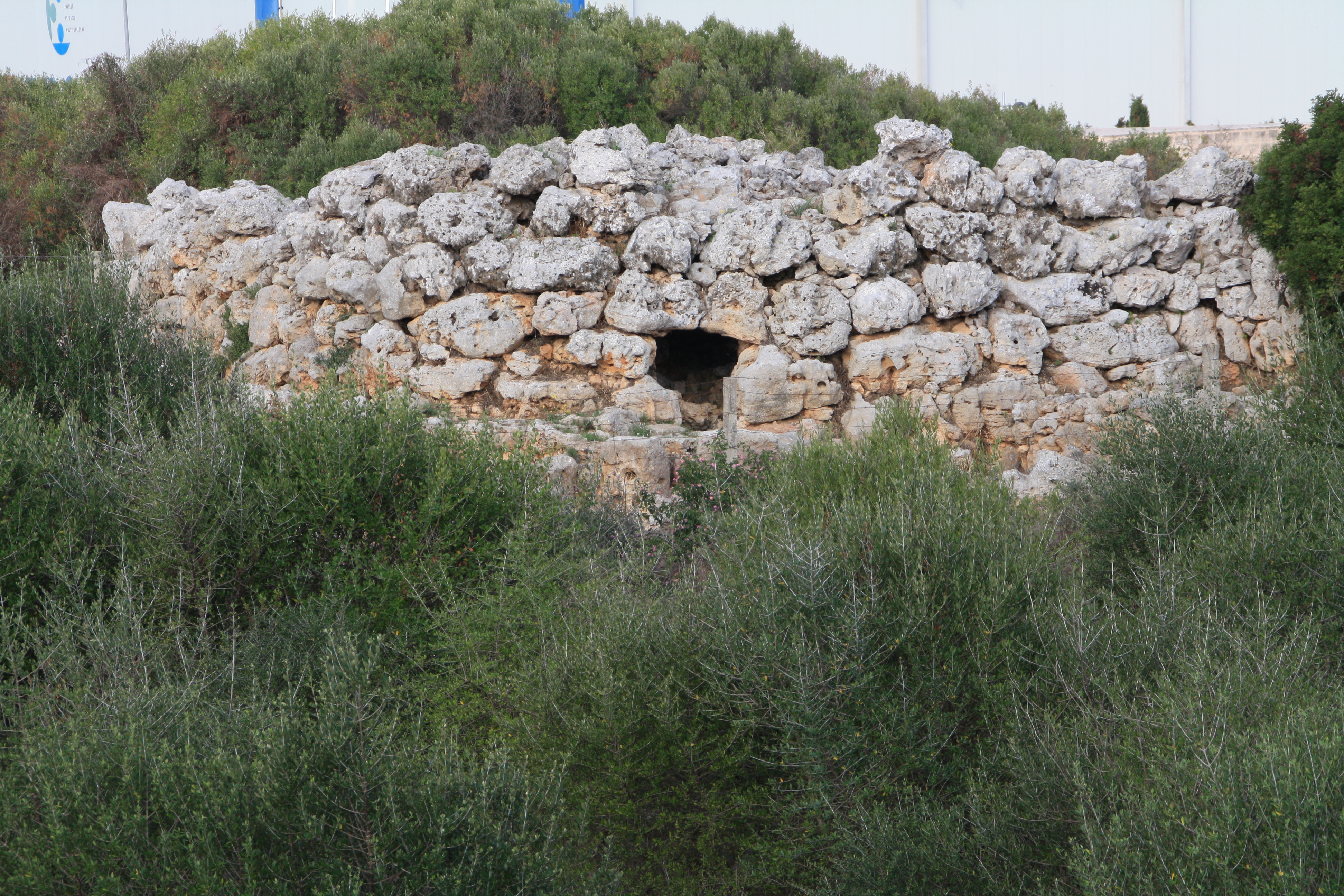 Westlicher Talayot in Trepucó, Menorca